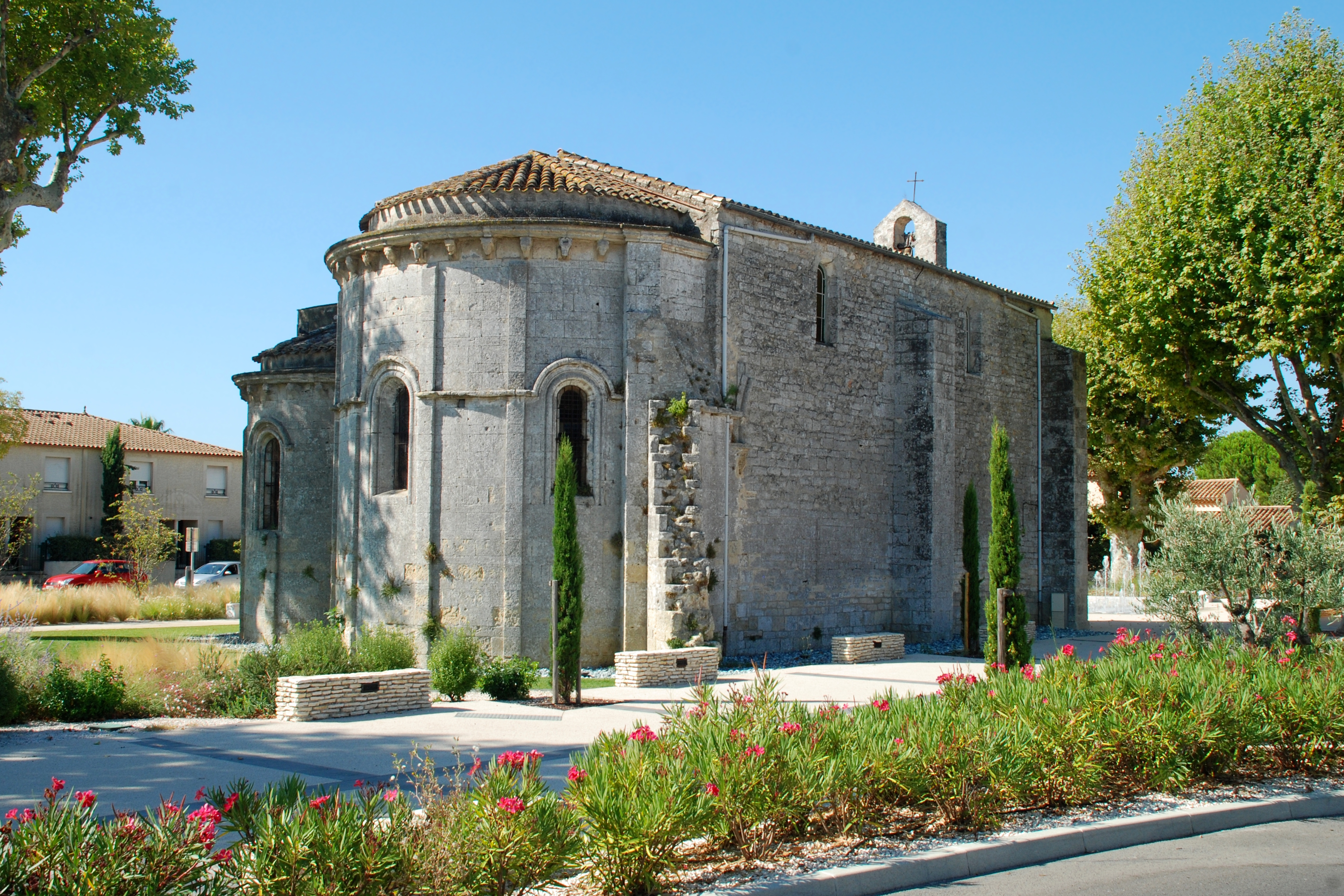 France - Languedoc - Hérault - Église Saint-Laurent de Lattes